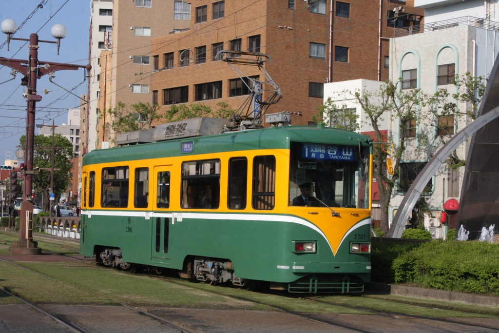 鹿児島市電2101